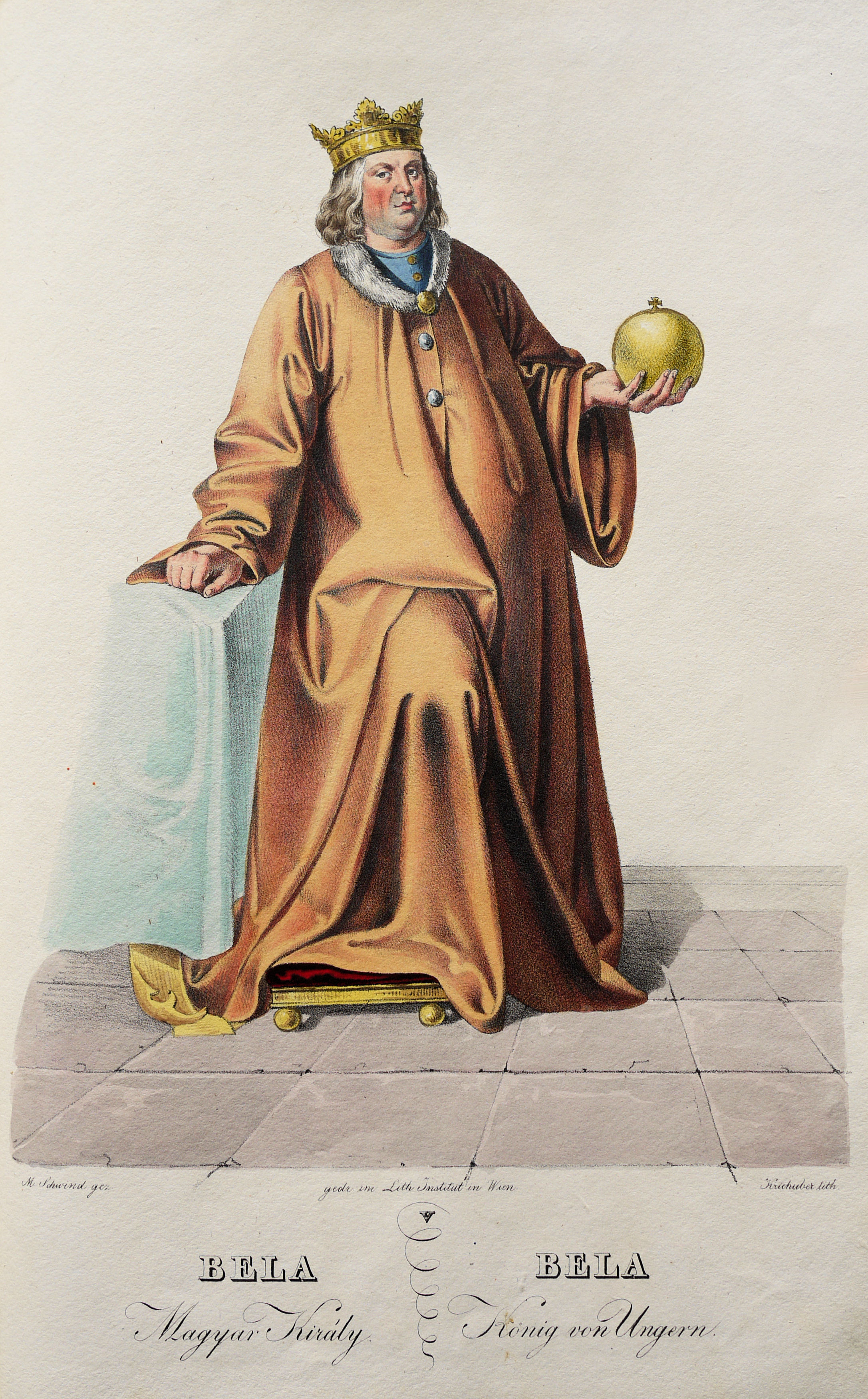 BélaI. (1015-1053), König von Ungarn. Lithographie von Josef Kriehuber nach einer Zeichnung von Moritz von Schwind aus Ungerns Erste Heerführer Herzoge und Koenige In einer Reihe von Bildnissen von Bela bis auf Seine Majestät Franz I. Kaiser Von Österreich König Von Ungern &c., &c. Wien : Lithographisches Institut ;ca. 1828